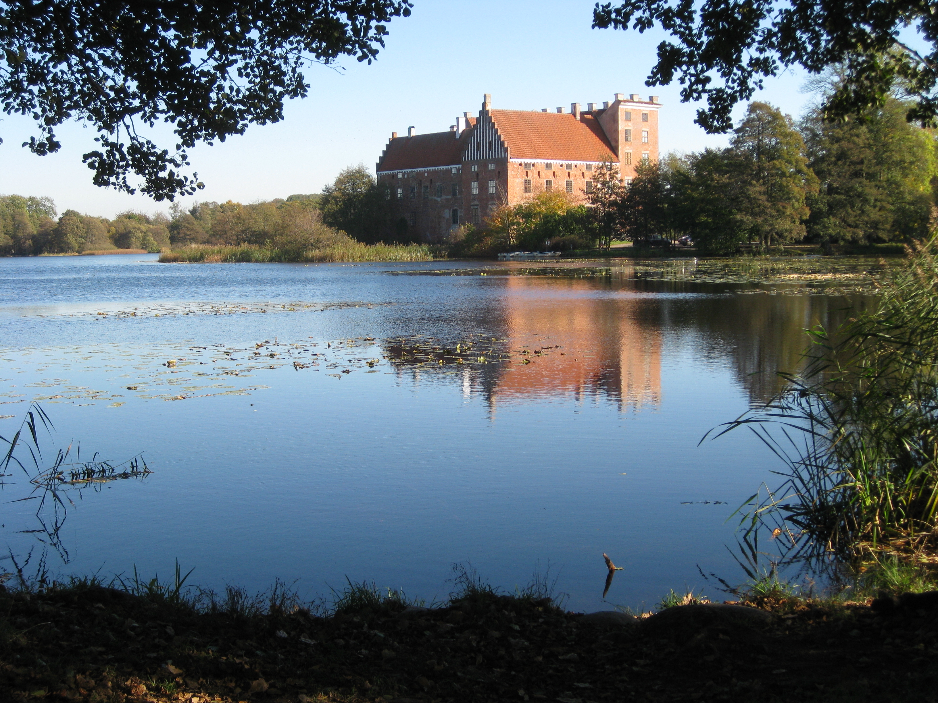 Svaneholms slott och Svaneholmssjön i Skåne